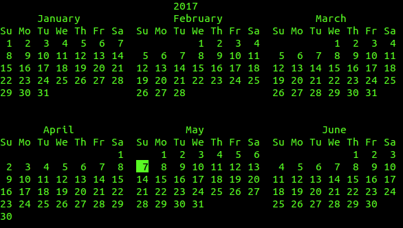 Cal-Command Unix